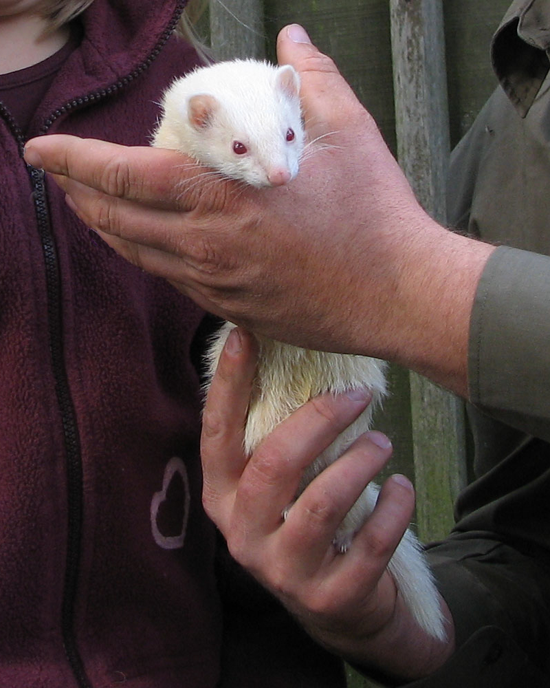 Jagd-Frettchen in der Hand eines Jägers (vermutlich in Deutschland)